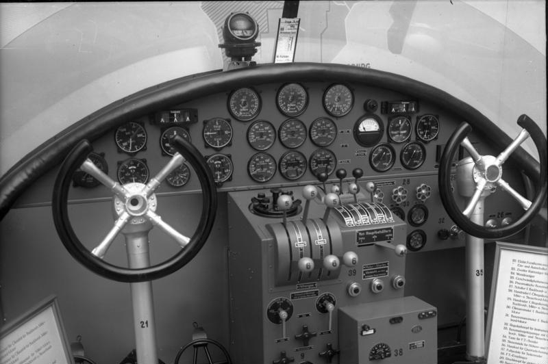 Die Eröffnung der großen Schau "Deutsches Volk-Deutsche Arbeit" am Kaiserdamm in Berlin! Die gewaltige Schaltanlage mit über 40 Instrumenten einer dreimotorigen Junkers Verkehrsmaschine, welche ein Ausdruck der Sicherheit der deutschen Verkehrsfliegerei ist.